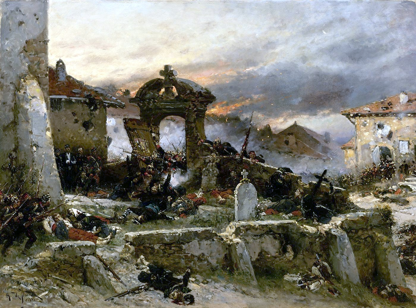 Adolphe de Neuville, Le Cimetière de Saint-Privat, le 10 août 1870, esquisse, localisation inconnue.